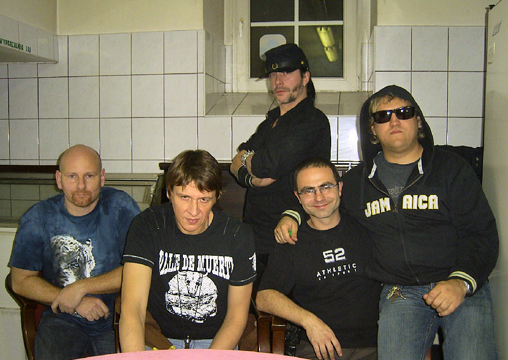 Homo Twist - koncert 12.11.2005 klub Fraktal, Mikołów